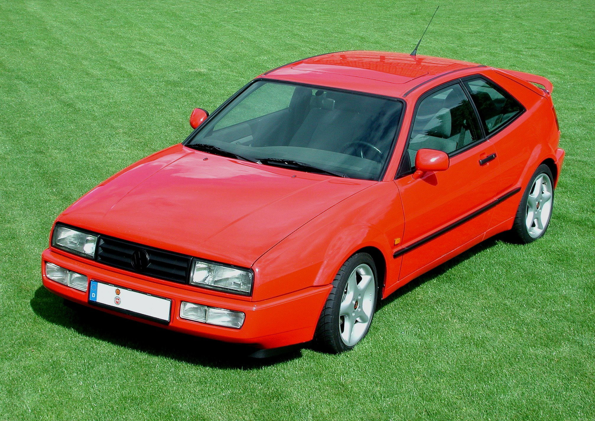 VW Corrado 16V 100kW Baujahr 1992, bis auf Felgen original (seitliche Frontansicht)